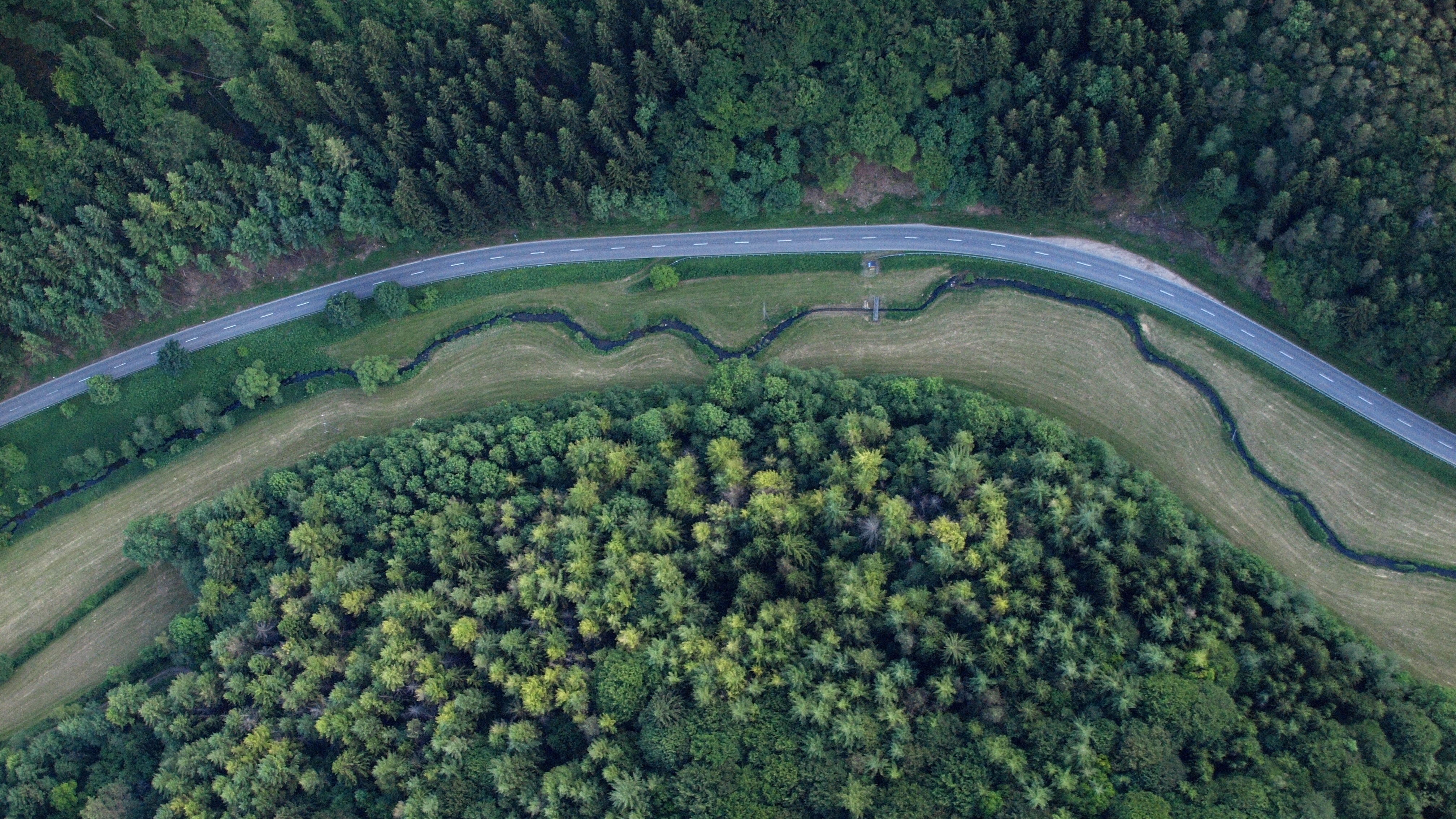 Die Nims bei Giesdorf, Luftaufnahme (2015)